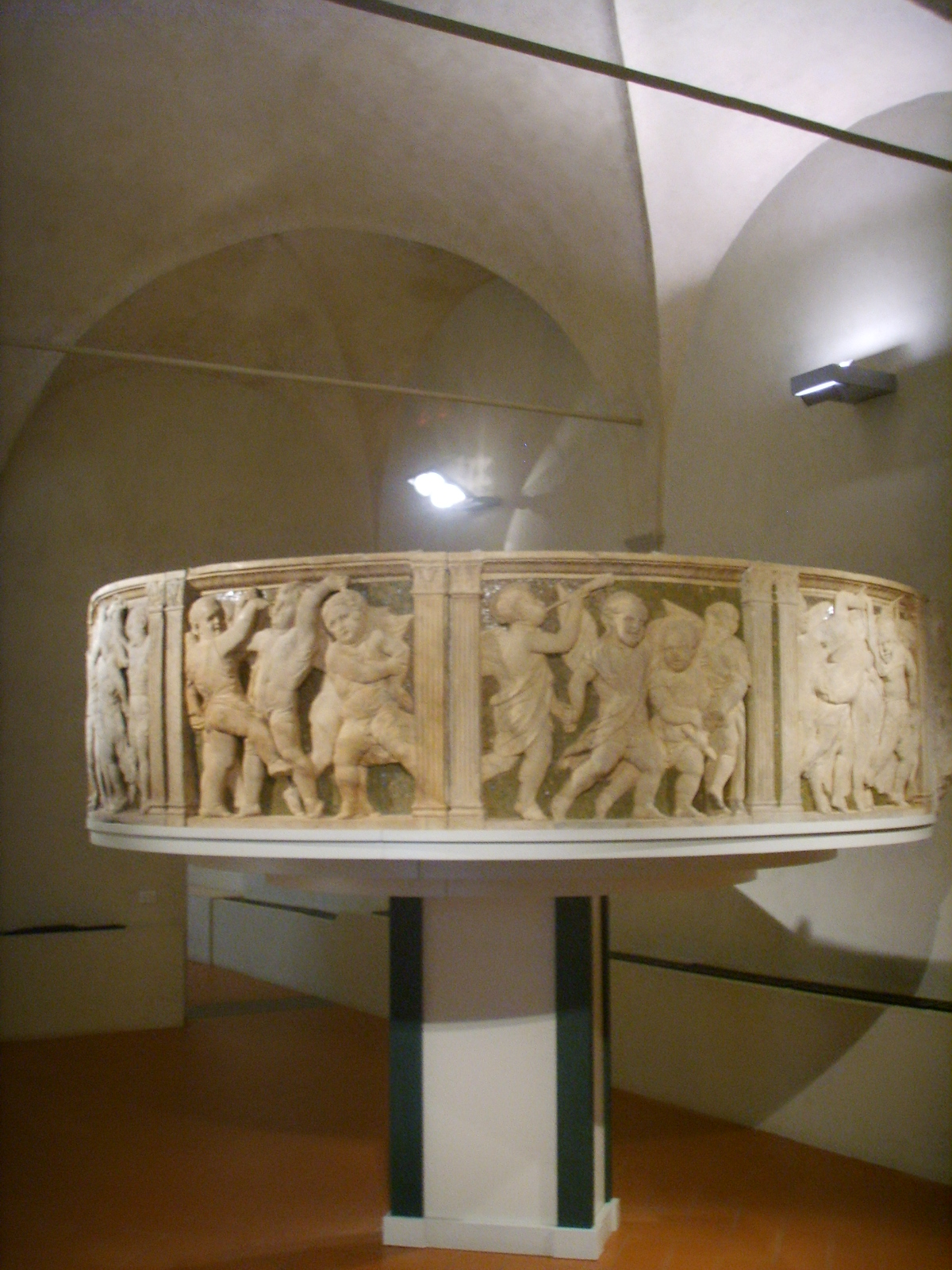 Pulpito di donatello (prato)